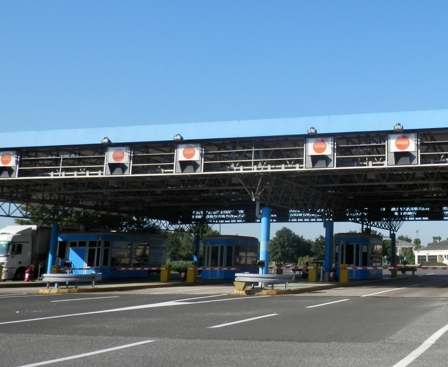 Starý hraničný priechod Goričan z Maďarska do Chorvátska. Leto 2016.